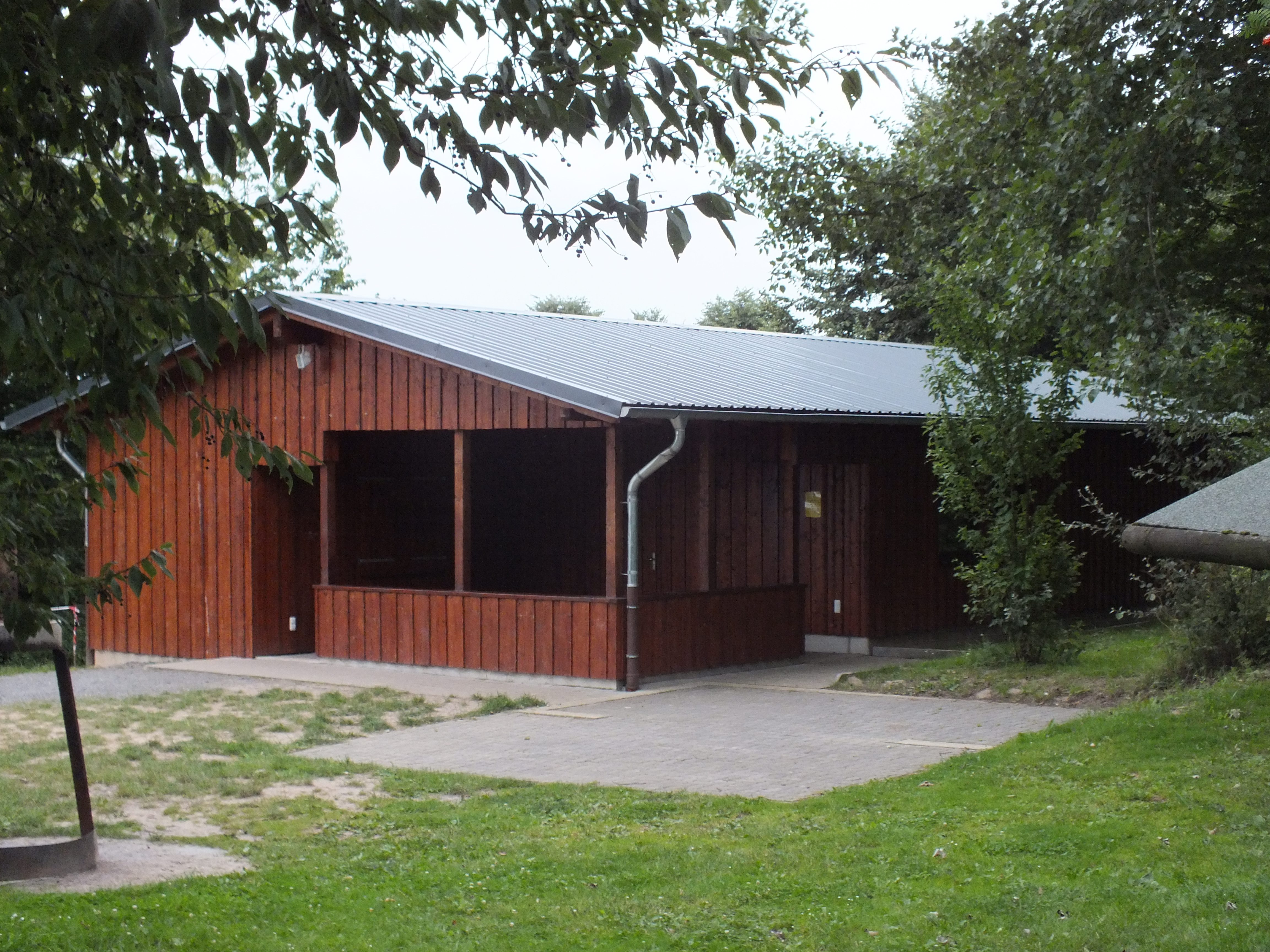 Die 2009 neu aufgebaute Grillhütte am Martinsweiher in Schauenburg-Martinhagen.